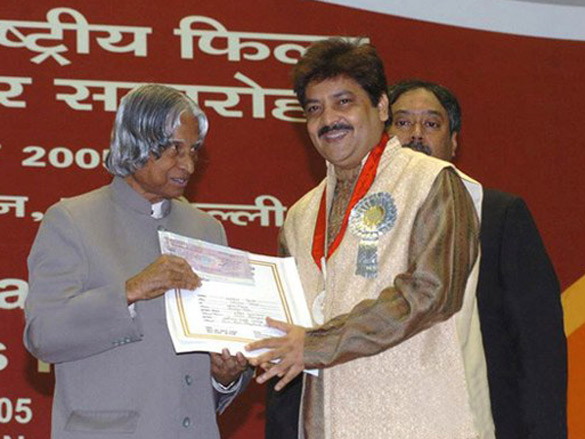 APJ Abdul Kalam presenting award to Udit Narayan at National Awards 2007